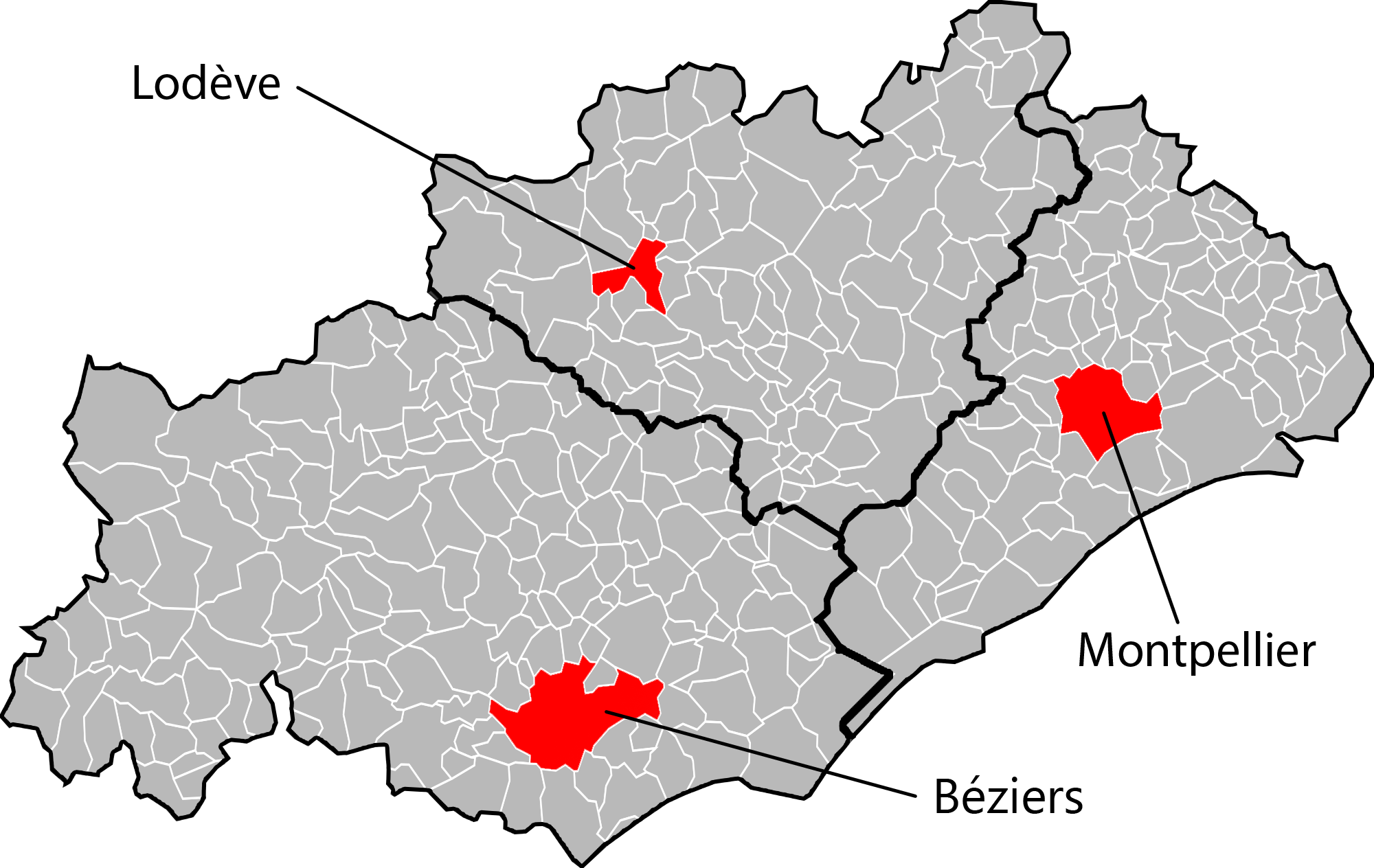 Carte des arrondissements de l'Hérault en 2016